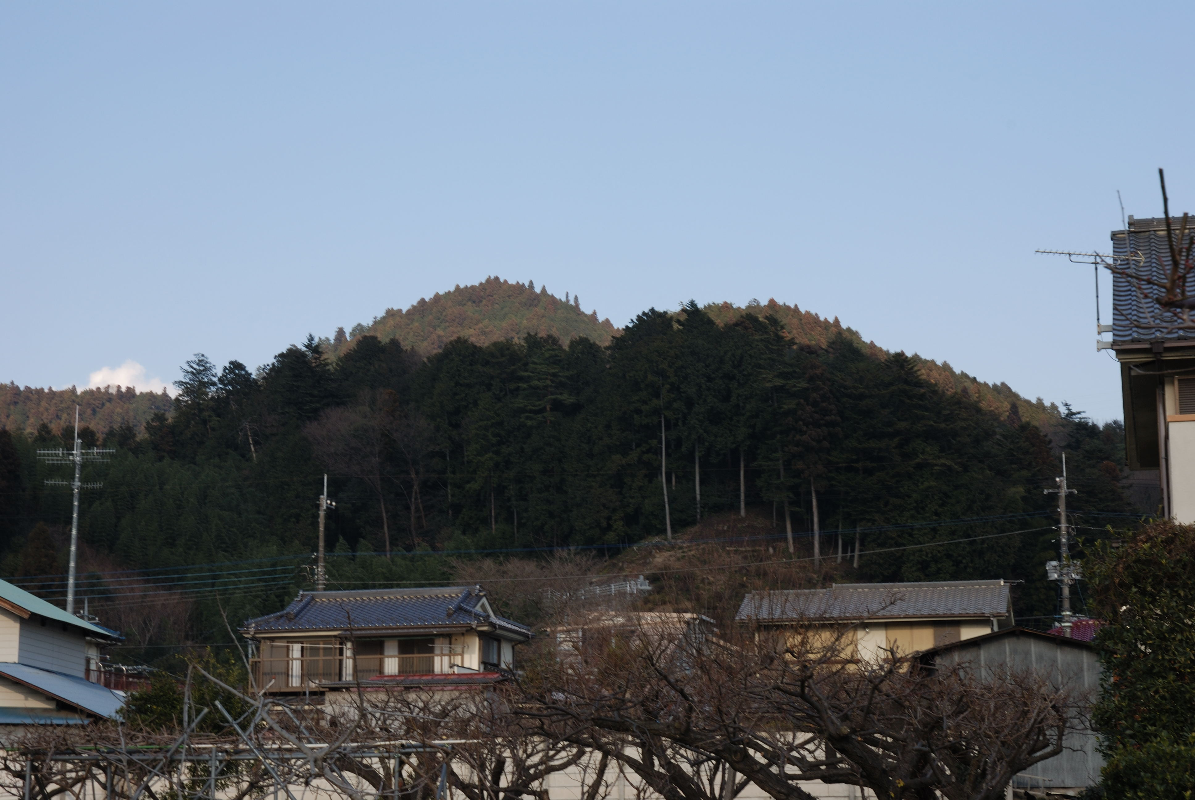 Karakai castle